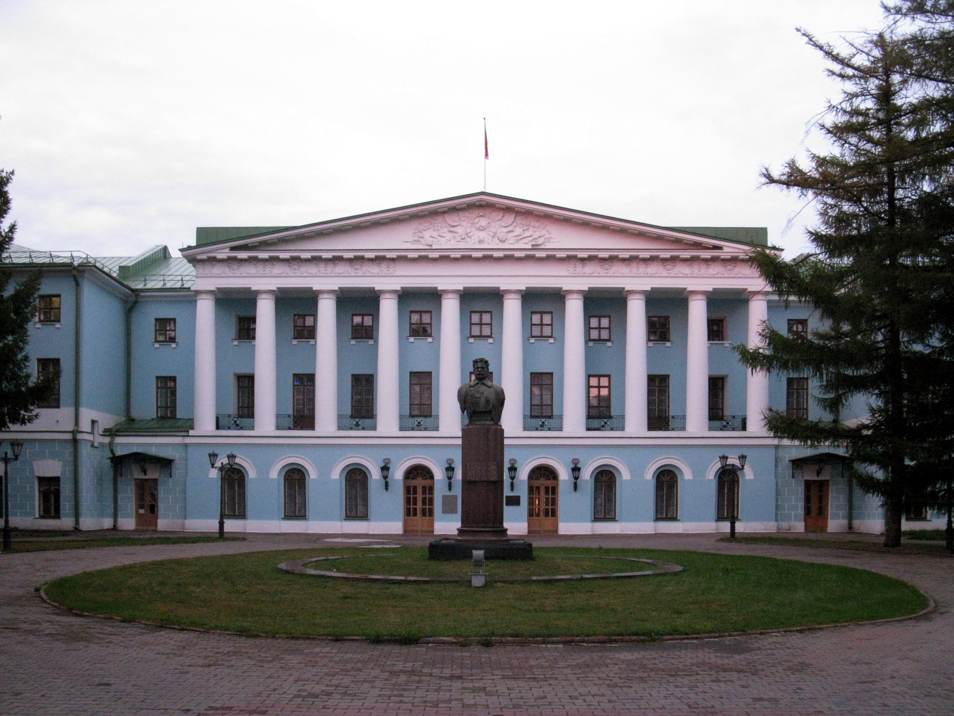 Центральный корпус, Центральное здание с двумя боковыми корпусами: Суворовская пл., дом 2, строение 1, Мещанский, Центральный округ, Москва